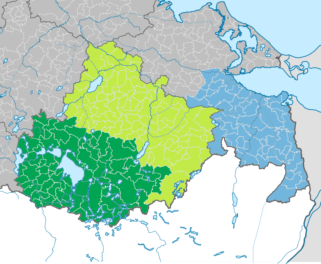 Karte der Amtsgerichtsbezirke im Landgerichtsbezirk Neubrandenburg nach Umsetzung der Gerichtsstrukturreform zum 28. September 2015 Amtsgericht Waren (Müritz) Amtsgericht Neubrandenburg Amtsgericht Pasewalk